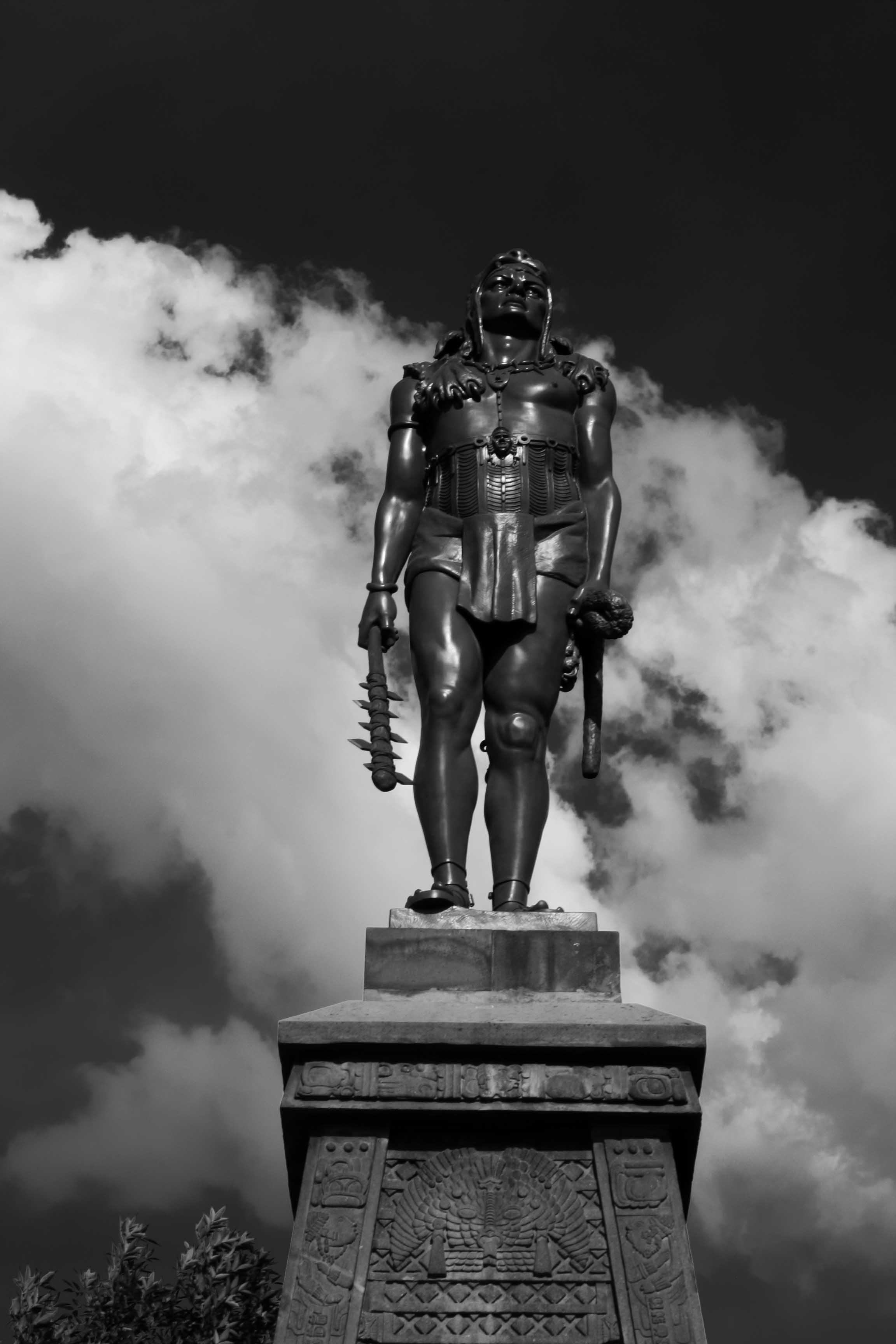 Escultura de Indios verdes en Mexico D.F.